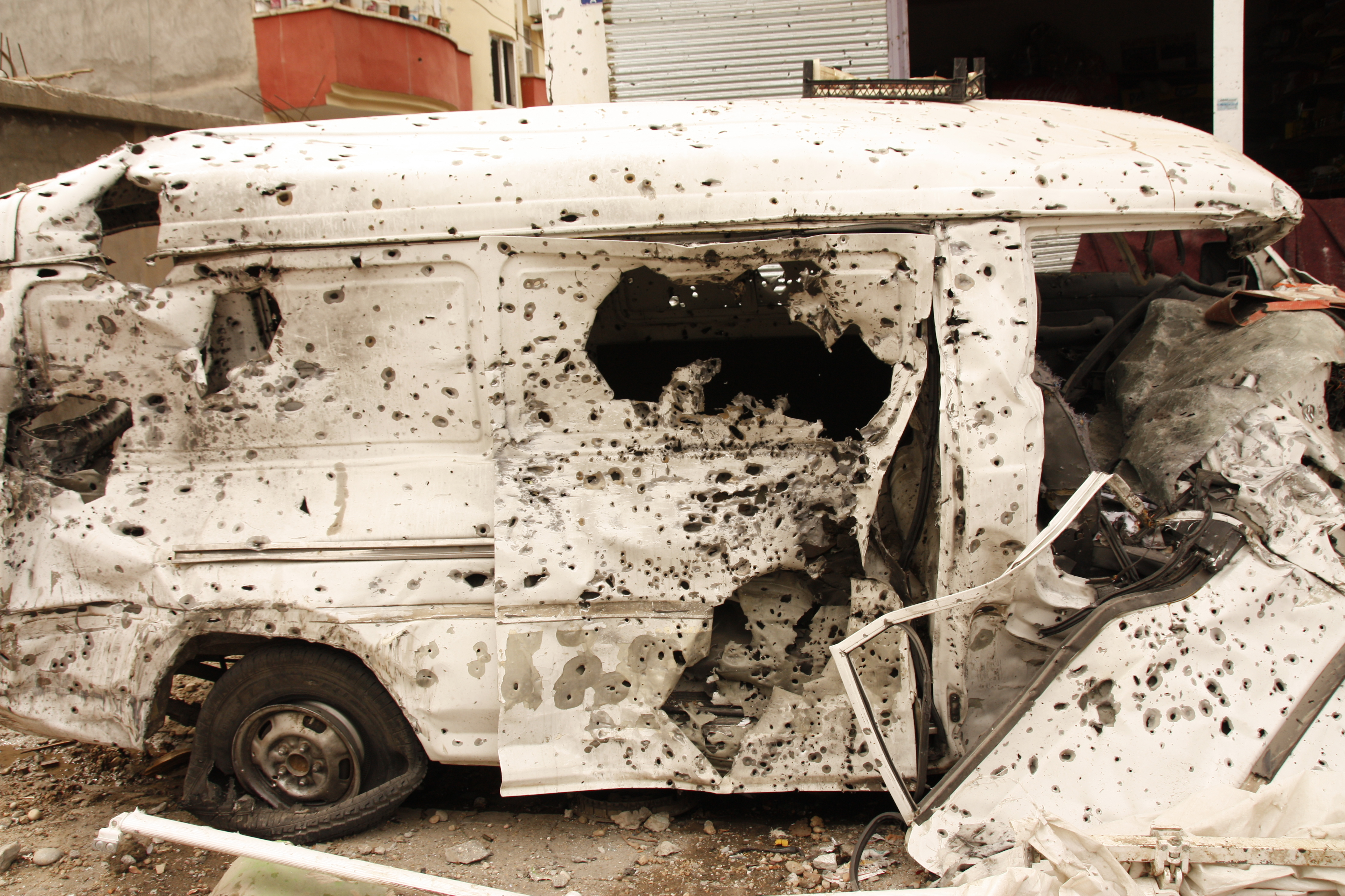 Şırnak çatışması, Eylül 2015